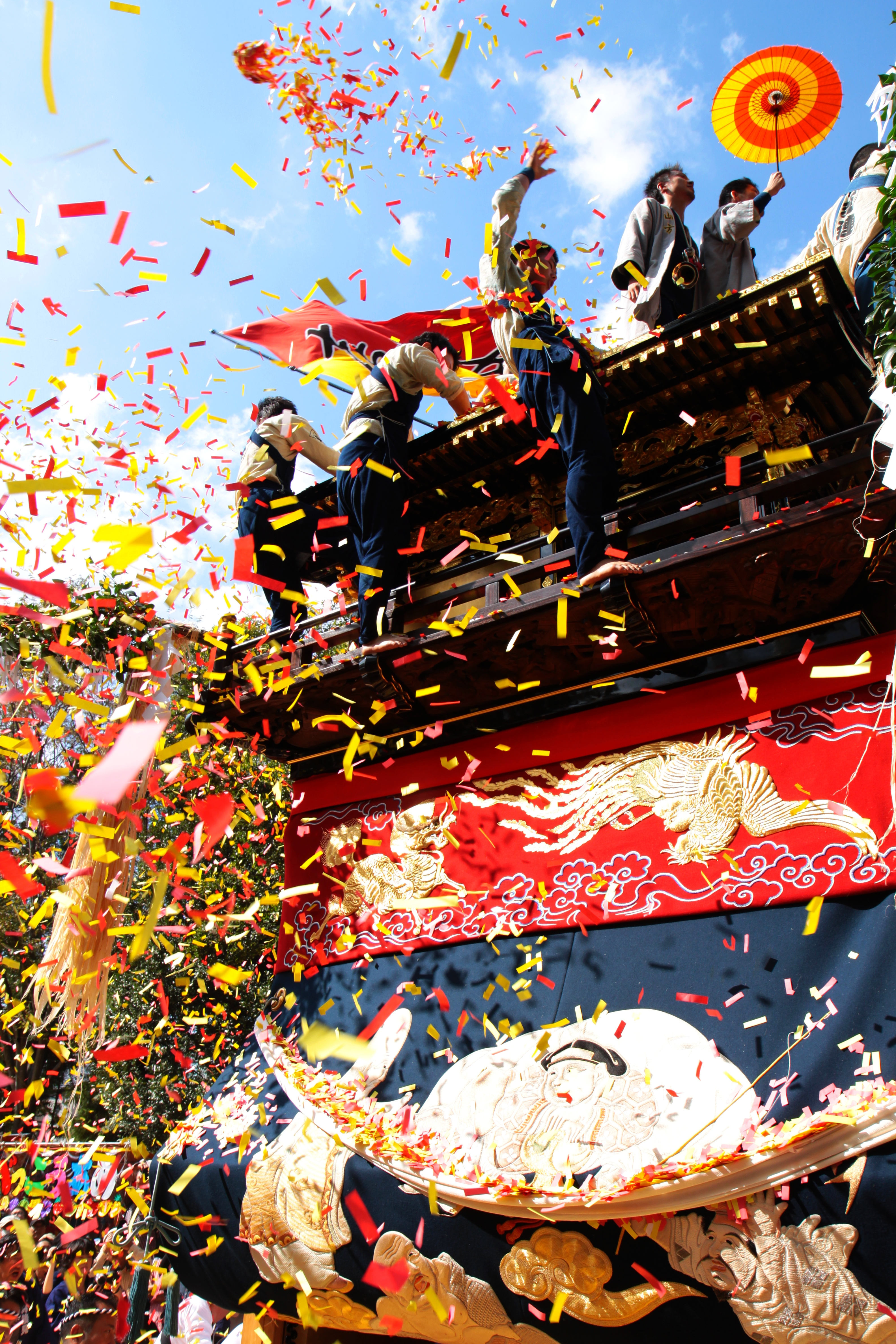 挙母まつり (愛知県豊田市元城町)